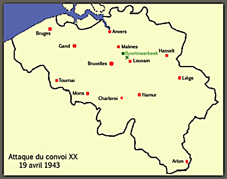 Attaque du XXe convoi entre Boortmeerbeek et Wespelaar, le 19 avril 1943